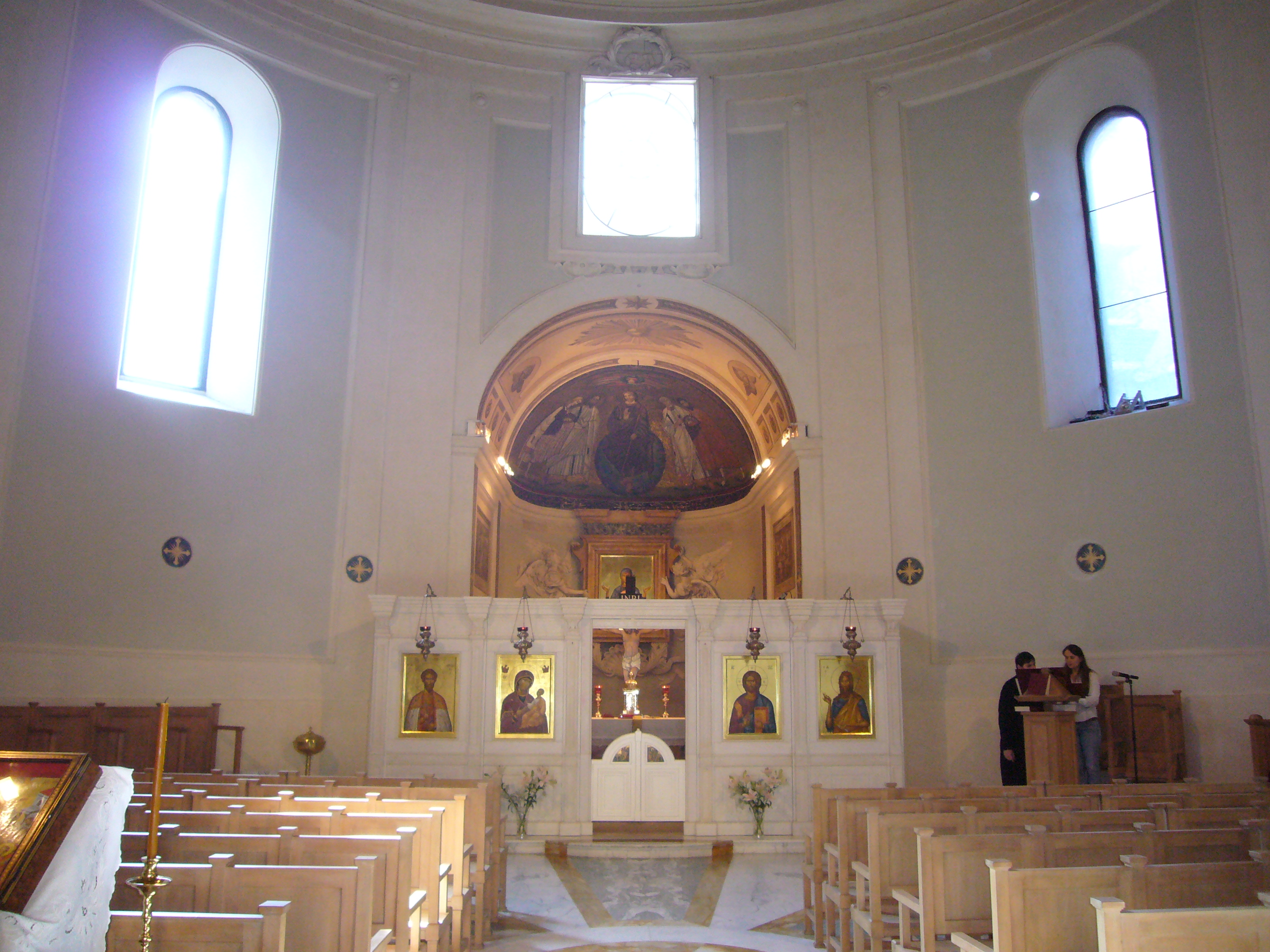 Roma, san Teodoro al Palatino, interno con iconostasi